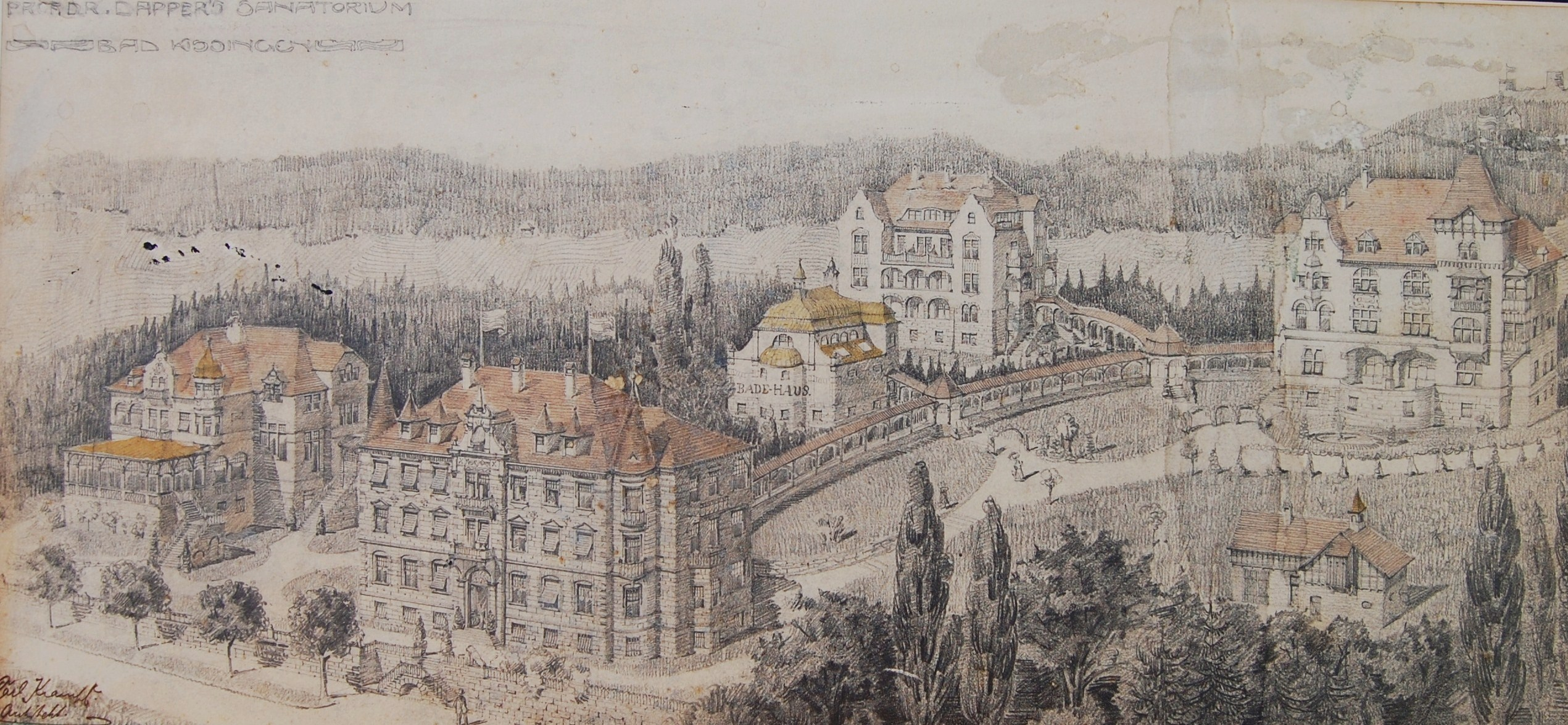 Anlage des Sanatoriums "Carl von Dapper" in Bad Kissingen; Zeichnung (1894) des ausführenden Bad Kissinger Architekten Carl Krampf